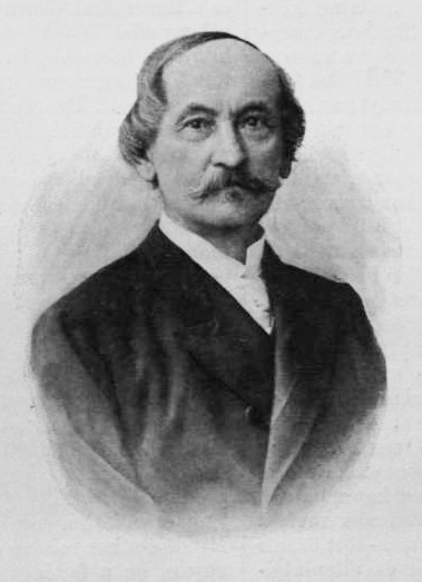 Dobsa Lajos (1824–1902) színész, drámaíró, 1848-as kormánybiztos, országgyűlési képviselő. Ellinger Ede felvétele